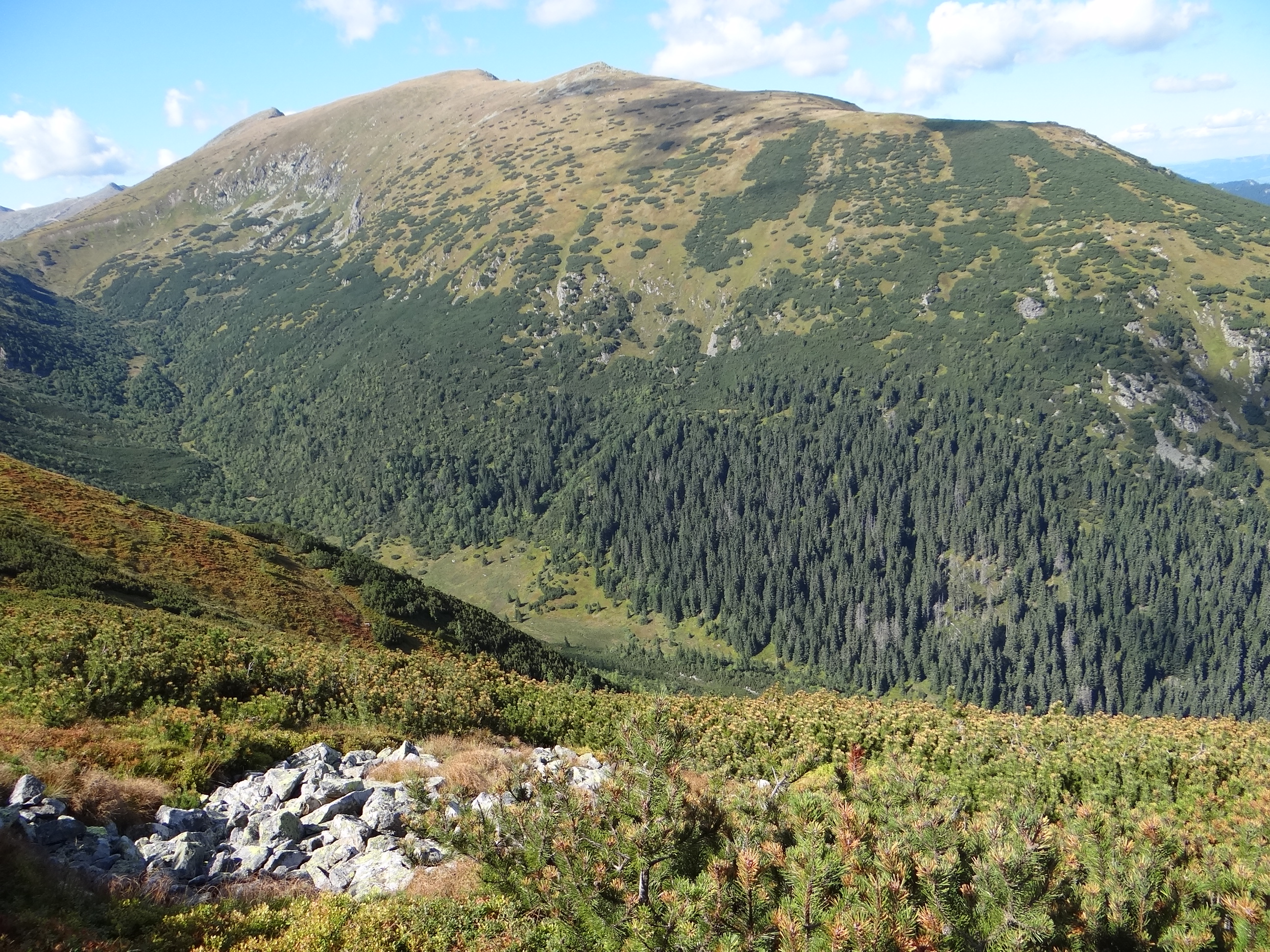 Štiavnica Nízke Tatry